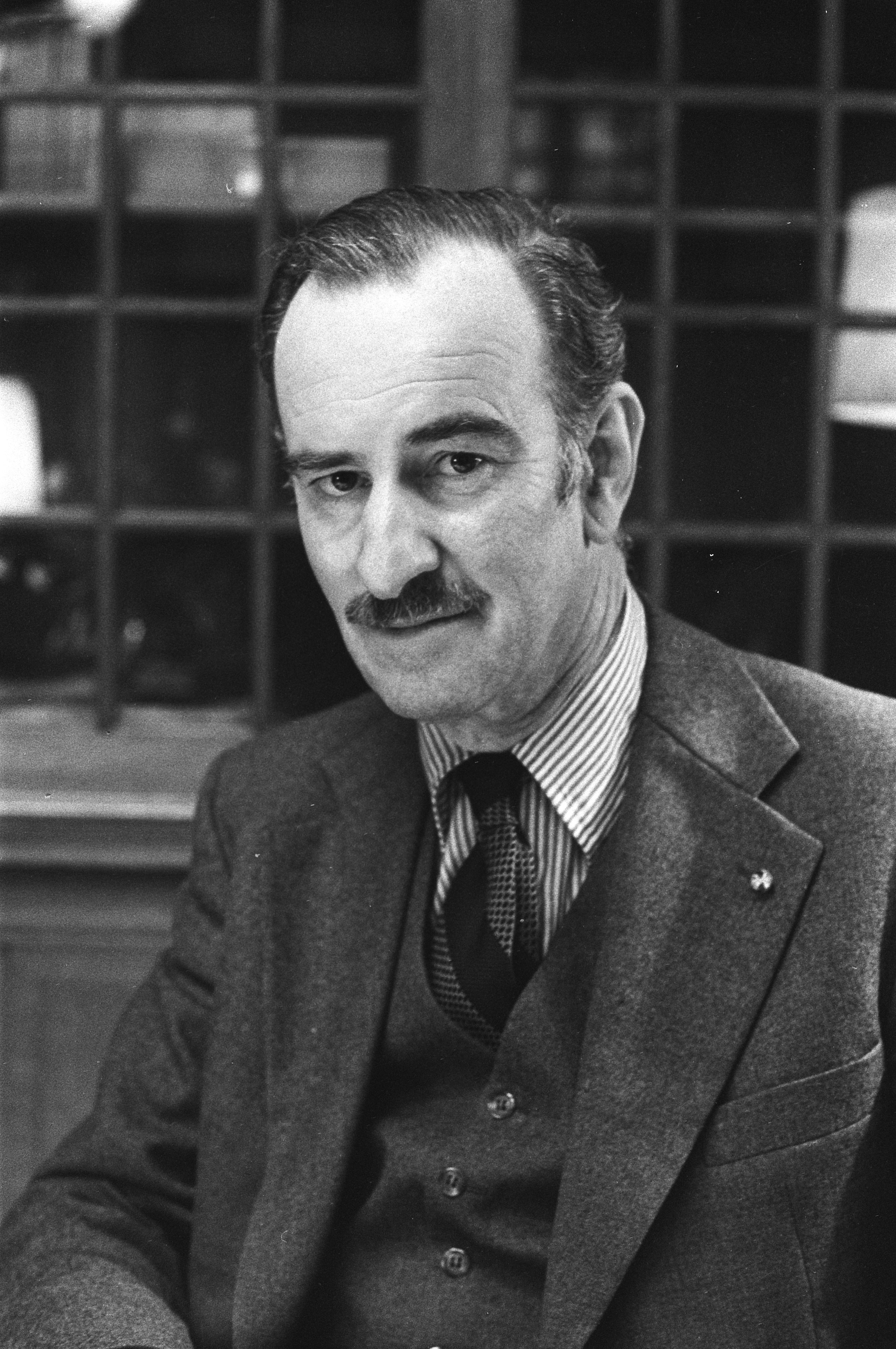 Collectie / Archief : Fotocollectie Anefo Reportage / Serie : [ onbekend ] Beschrijving : Kabinetsformatie; dr. C.A. van der Klaauw (VVD) nieuwe minister van Buitenlandse Zaken Datum : 13 december 1977 Trefwoorden : ministers, portretten Persoonsnaam : Klaauw, Chris van der Instellingsnaam : VVD Fotograaf : Verhoeff, Bert / Anefo Auteursrechthebbende : Nationaal Archief Materiaalsoort : Negatief (zwart/wit) Nummer archiefinventaris : bekijk toegang 2.24.01.05 Bestanddeelnummer : 929-4807